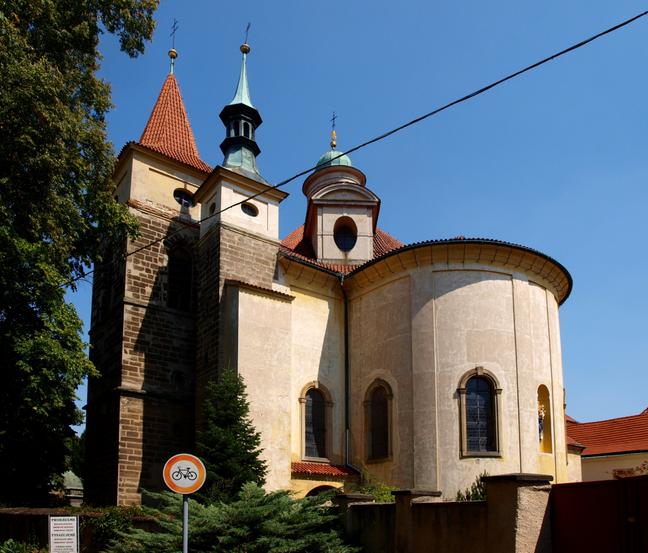 Klášter ve Slaném